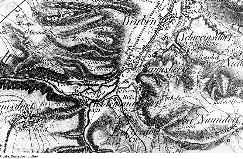 Original image description from the Deutsche Fotothek Freital-Hainsberg. Oberreit, Sect. Dresden, 1821/22